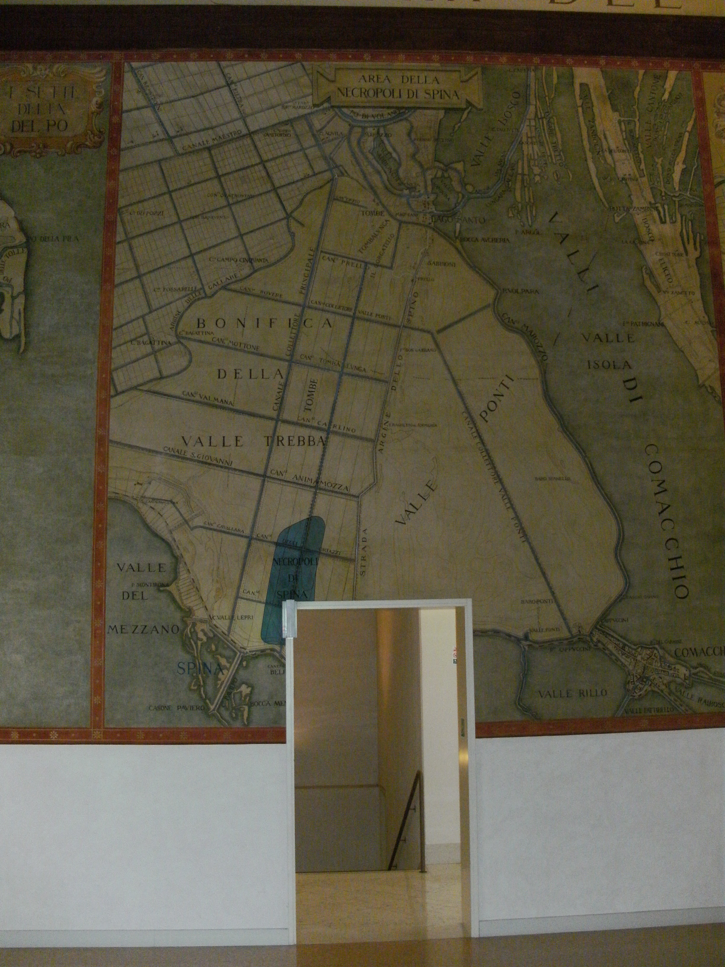 Archäologisches Nationalmuseum Ferrara, Zentralhalle im Obergeschoss, Wandmalerei: rekonstruierte historische Karte der Stadt Spina (7 km südöstlich von Comacchio)und ihrer Umgebung